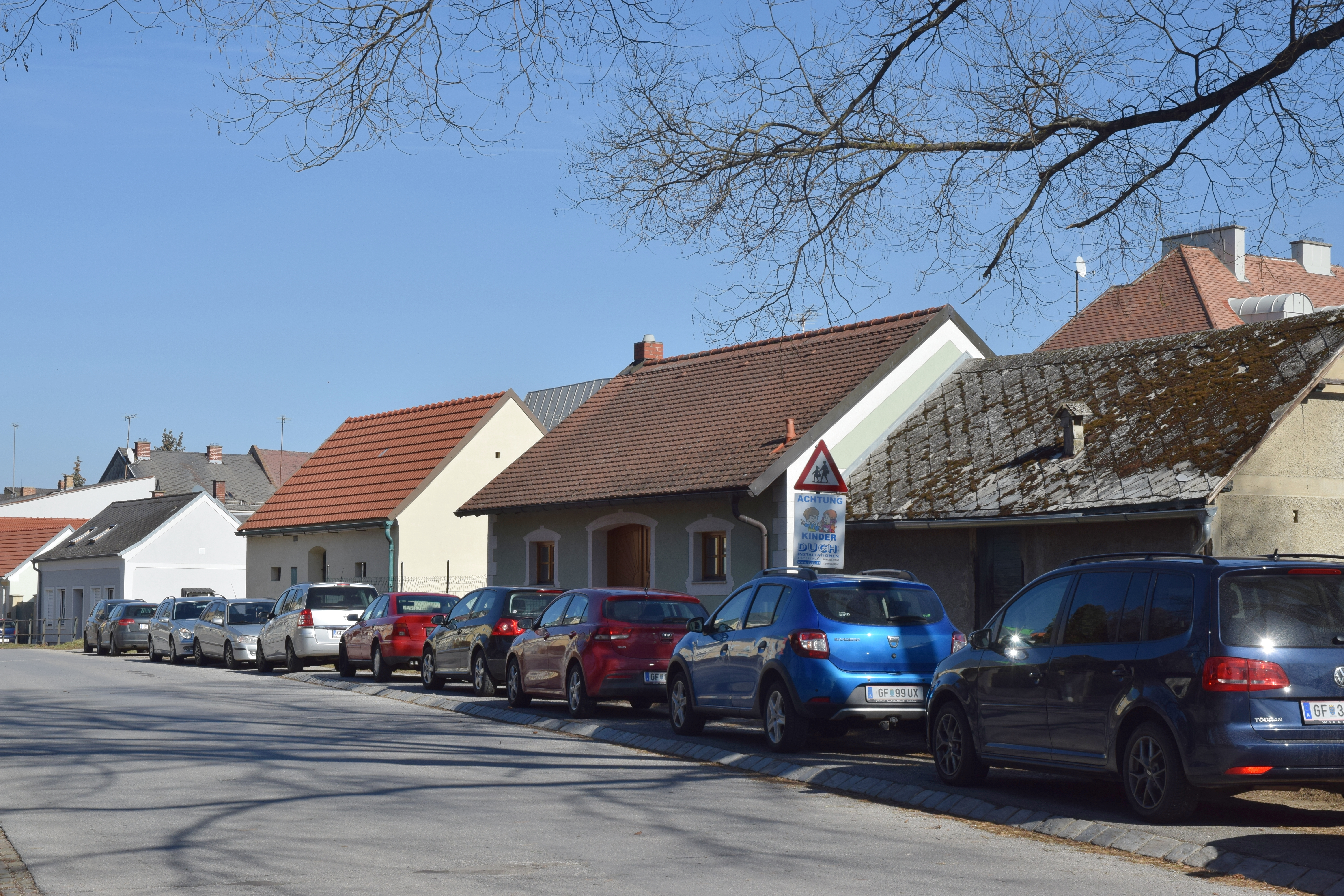 Kellergasse Schlossberggasse in der KG Zistersdorf in Zistersdorf